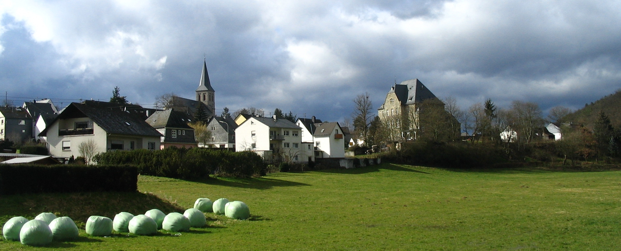 Rhaunen, Blick von Osten mit Kirche und altem Amtsgerichtsgebäude